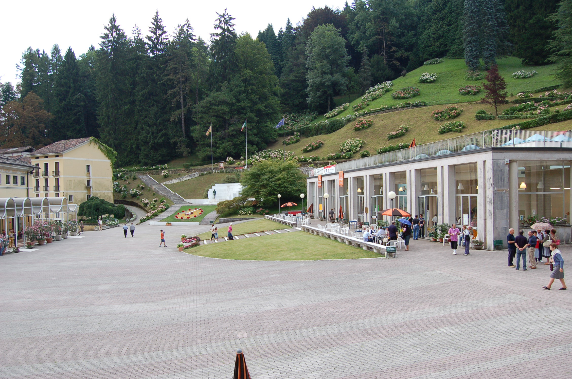 Terme di Recoaro Terme (VI)